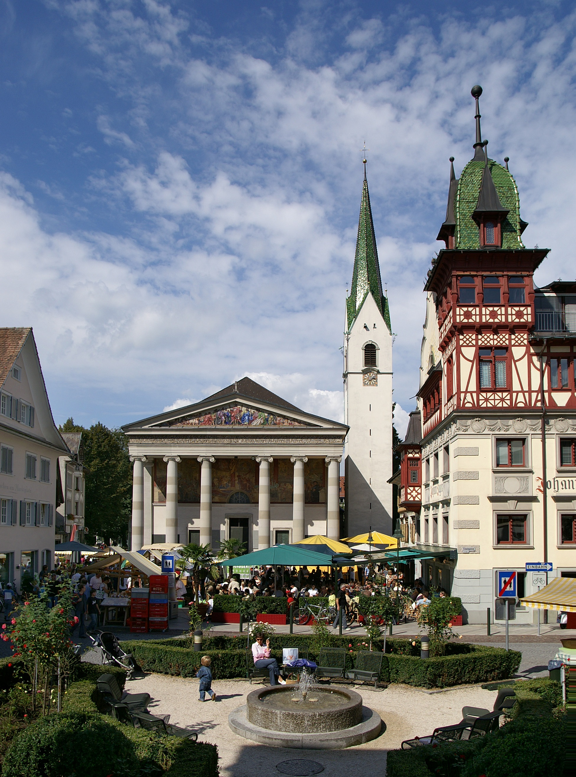 der Marktplatz in Dornbirn mit Johann Luger Haus (Cafe Steinhauser)